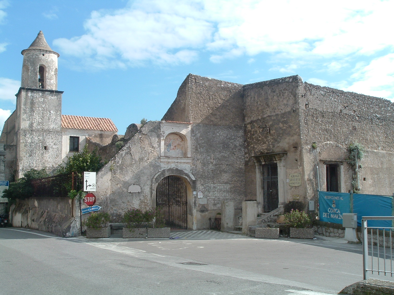 Monastero di Santa Rosa in Conca dei Marini, in the Amalfi Coast